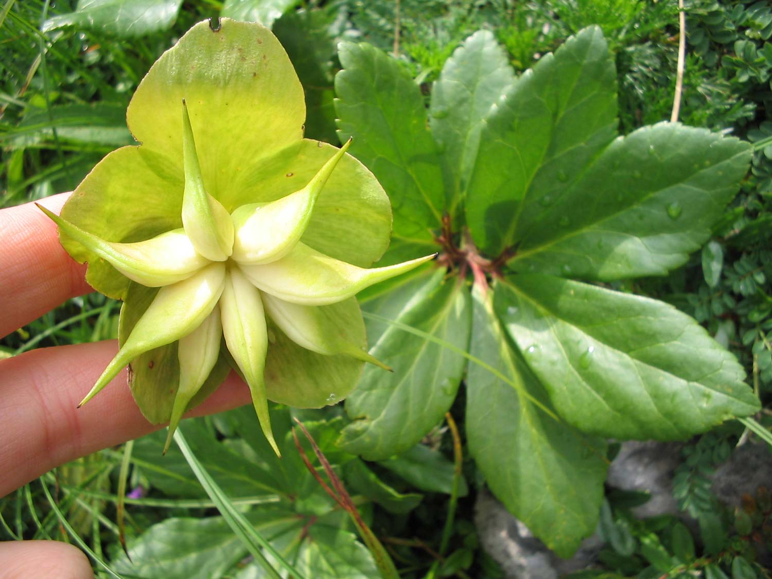 Description: Helleborus niger - Schneerose: Früchte Source: selbst fotografiert Date: 13. Aug. 2005 16h Photographer: Michael Gasperl (Migas) Location: AUT/Stmk/Ausseerland/Salzsteig